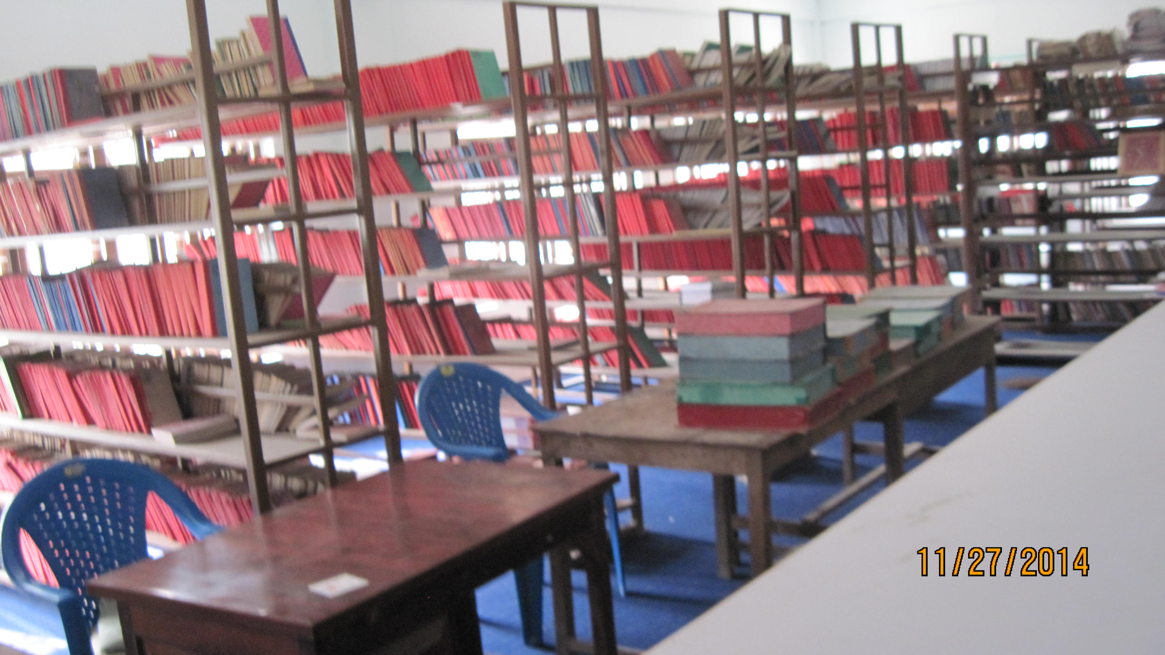 नेपाली: कनपा ३ सुरुङ्गा, झापास्थित कनकार्इ बहुमुखी क्याम्पसकाे पुस्तकालय कक्ष ।